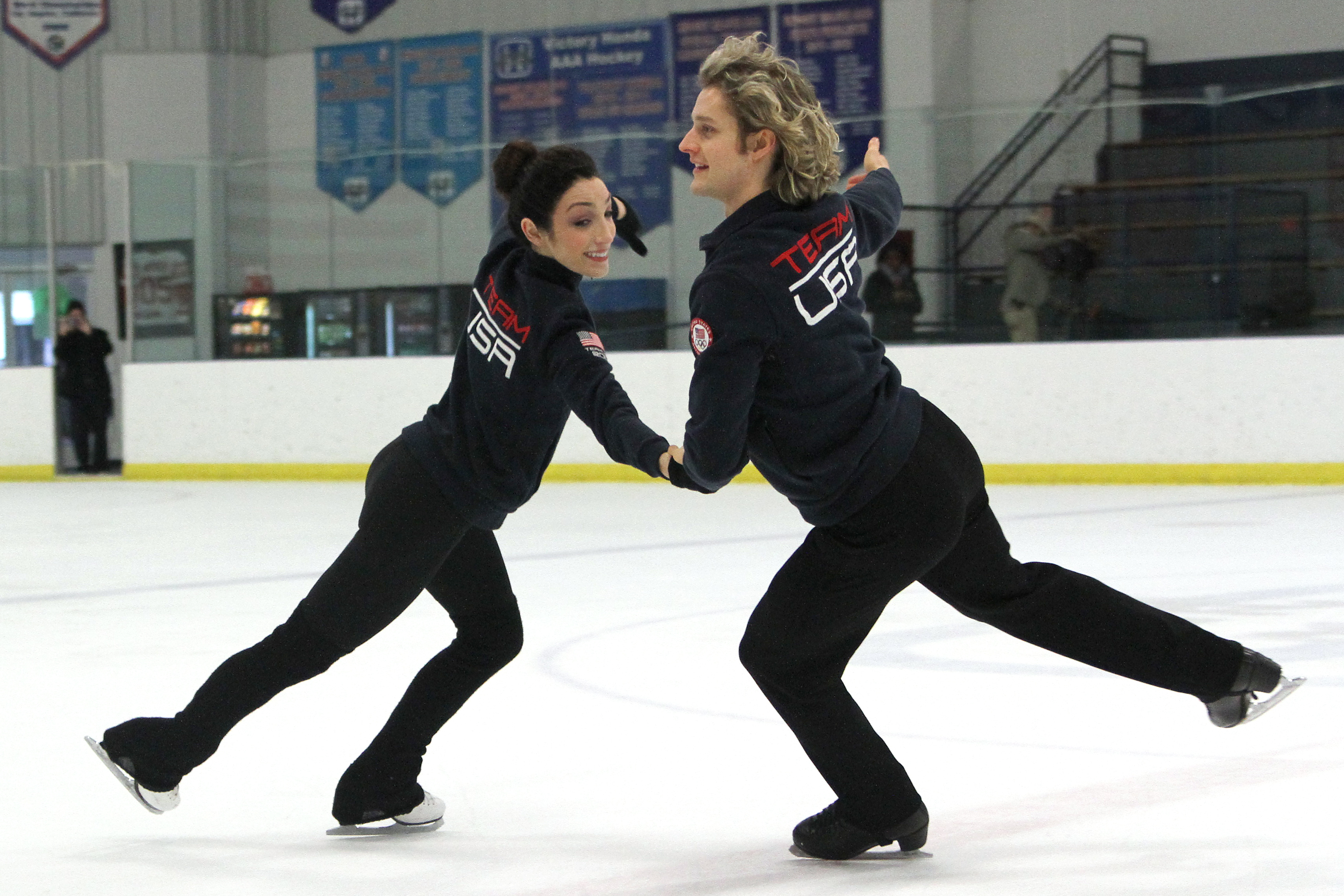 Adam Glanzman